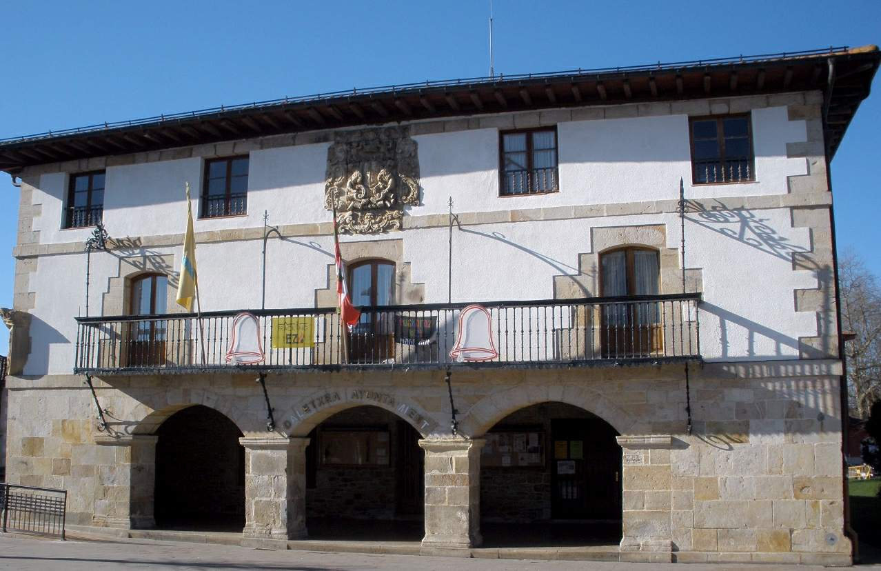 Ayuntamiento de Zuia, en Murguía (Álava)